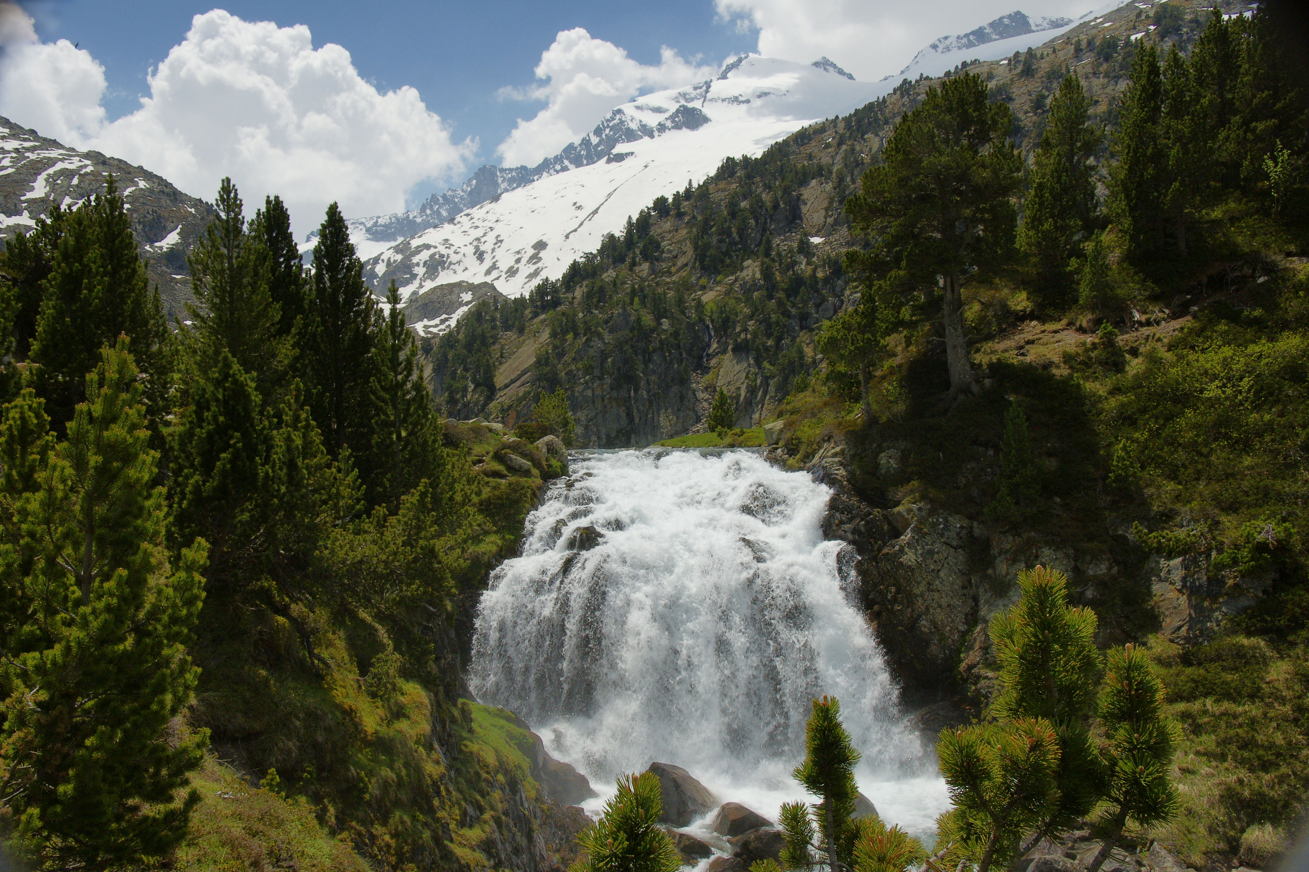 Aigualluts - Benasque Aragón (Spain)